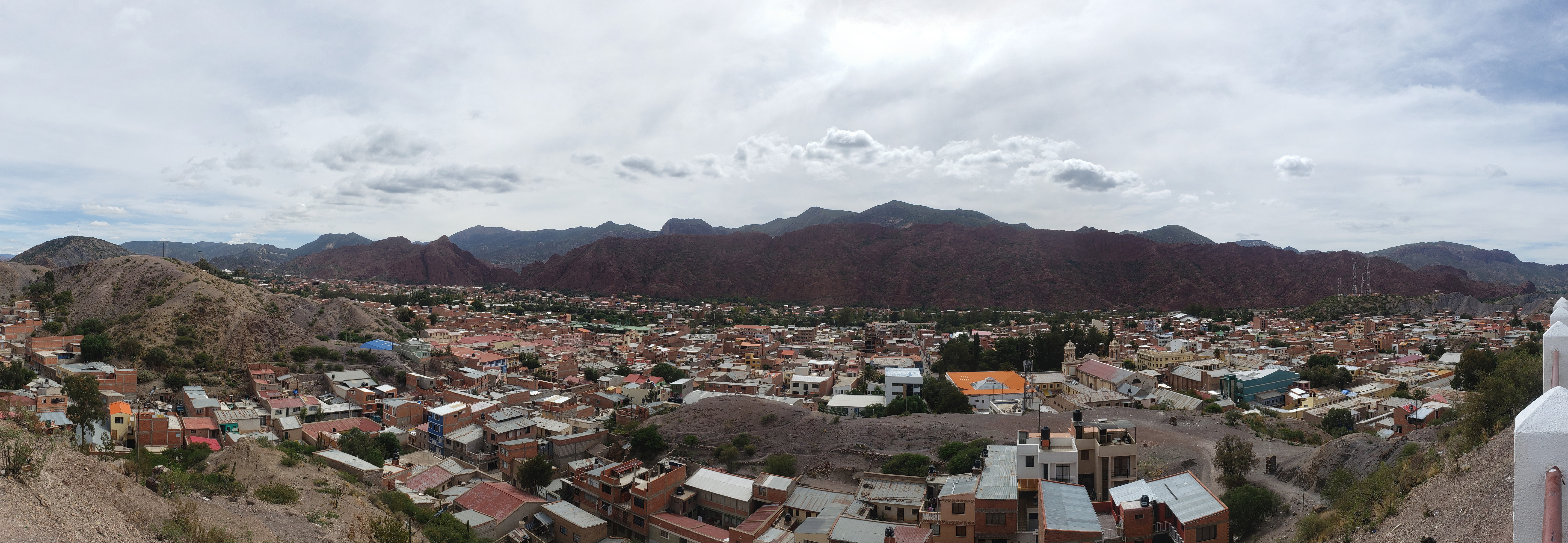 Panoramica de la Ciudad de Tupiza tomada desde el cerro Corazon de Jesus